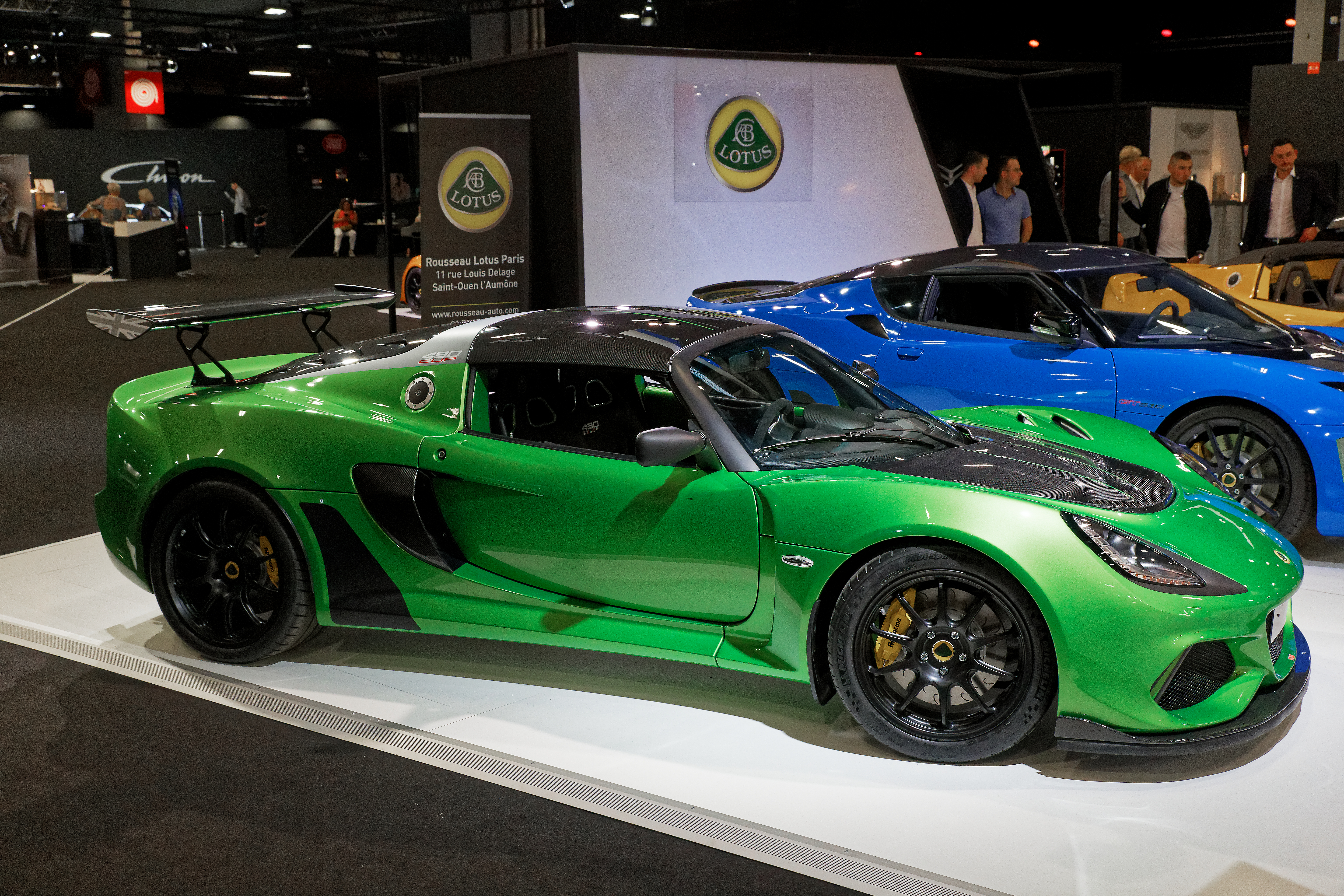 Une Lotus Exige Cup 430 exposée lors du mondial de l'automobile de Paris 2018.